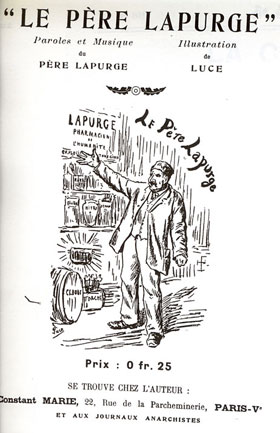 "Le Père Lapurge" est une chanson de Constant Marie écrite en 1885-1886. Ici publiée en livret par le groupe de "La Muse rouge" en 1905 ou 1906.